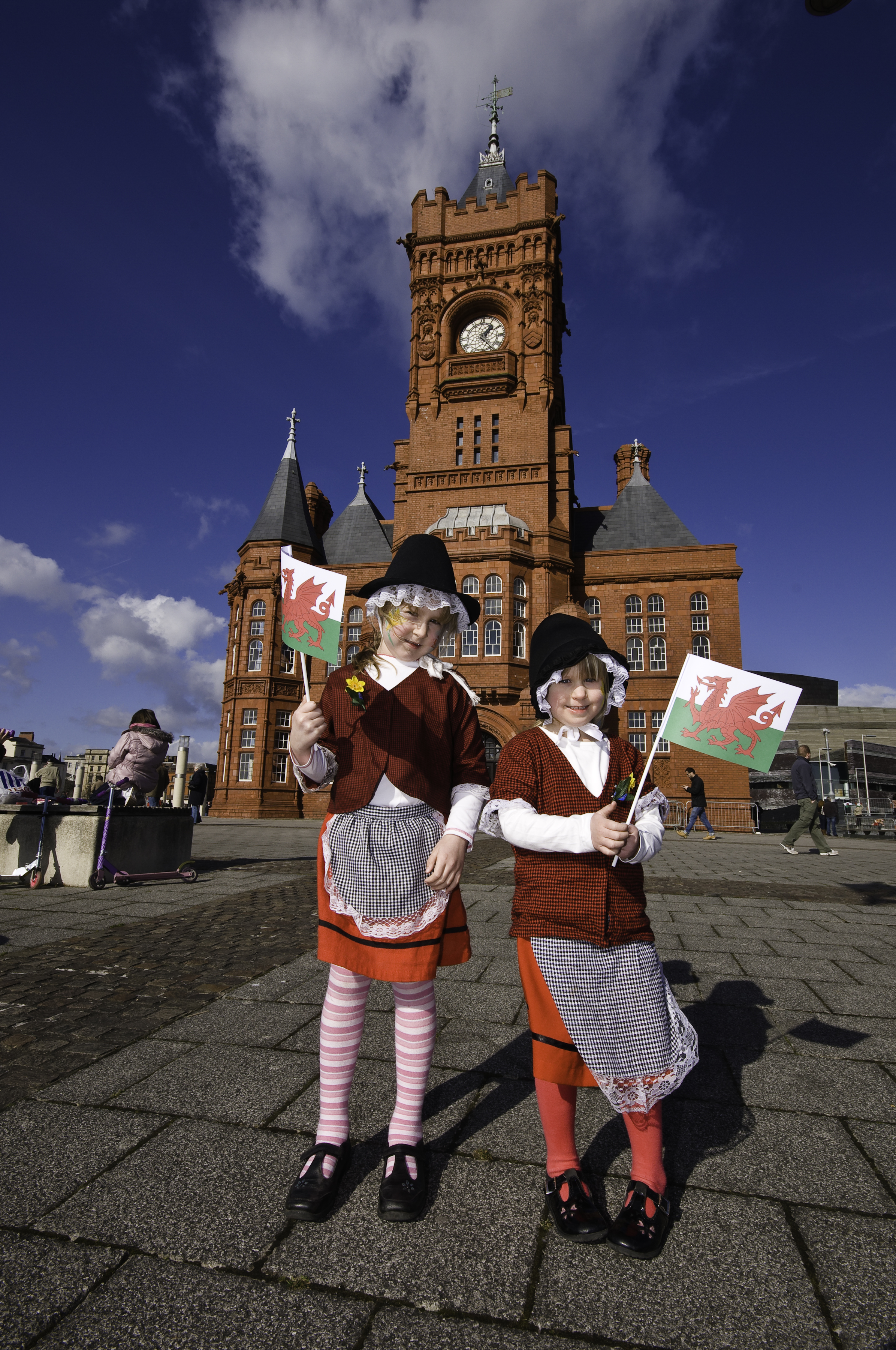 St David's Day Celebration, Cardiff Bay, March 1st 2009 ________________________________ Dathliadau Dydd Gŵyl Dewi, Bae Caerdydd, 1 Mawrth 2009